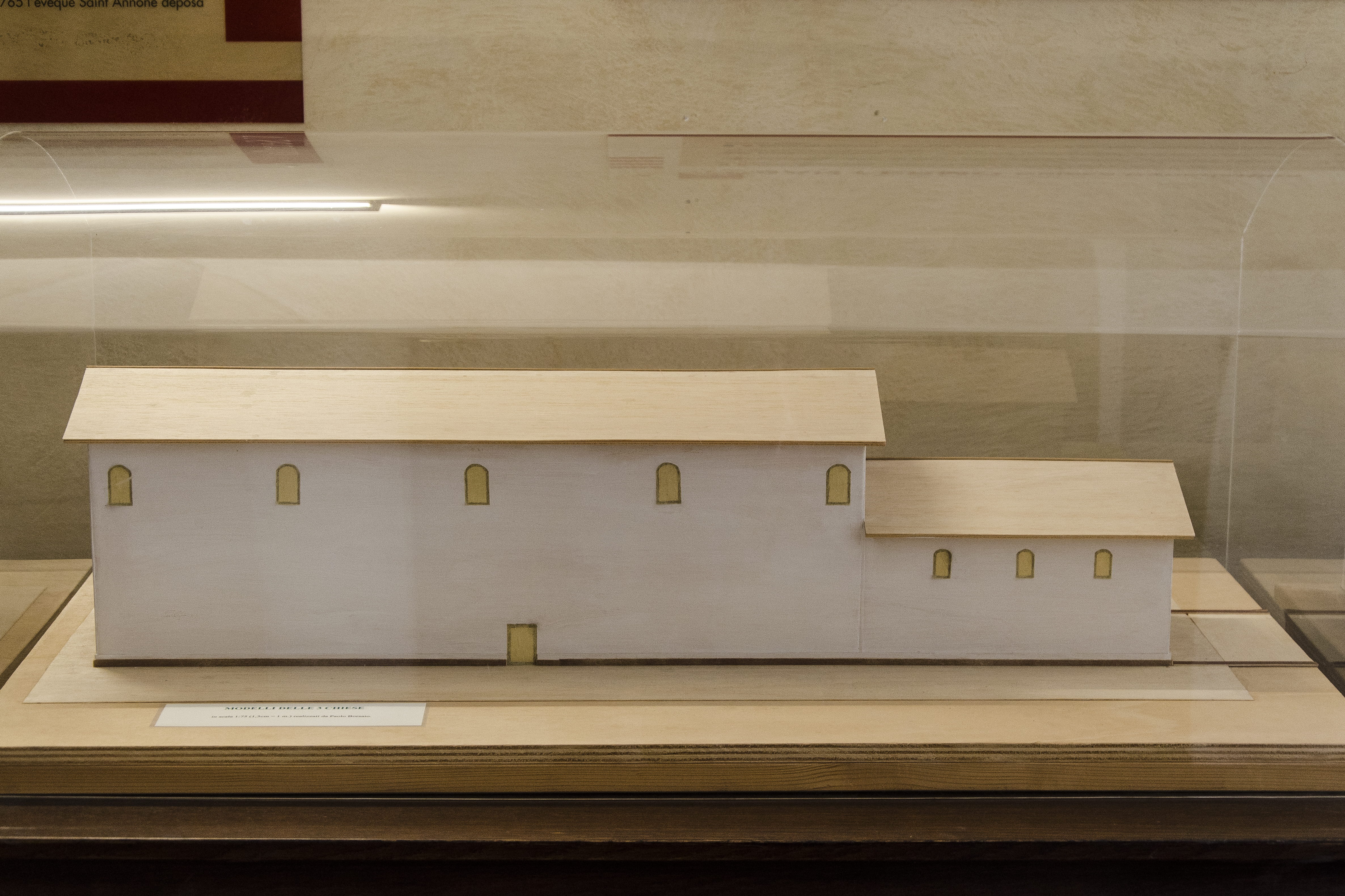 Modello della chiesa - prima fase. Modello realizzato da Paolo Borsato